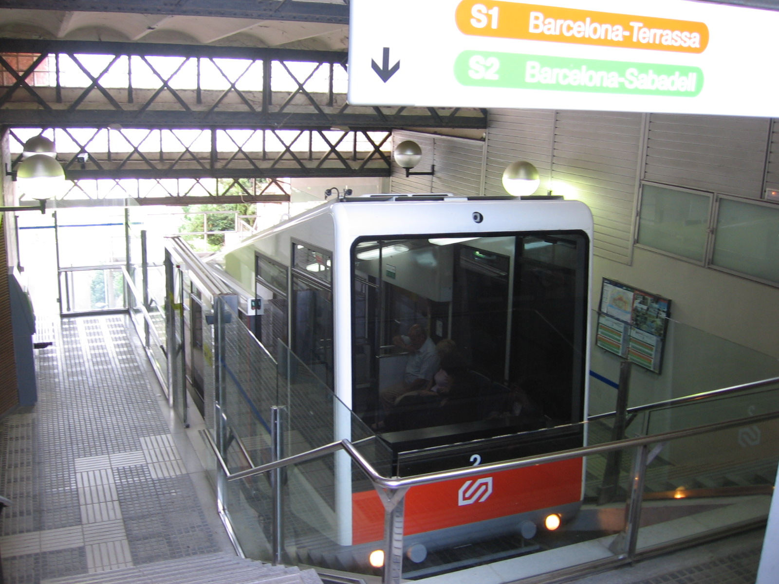 Funicular de Vallvidrera, Barcelona, Vallvidrera Superior station/Funicular de Vallvidrera, Barcelona, estació Vallvidrera Superior